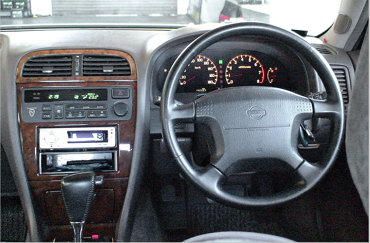 Nissan Leopard (JY33)